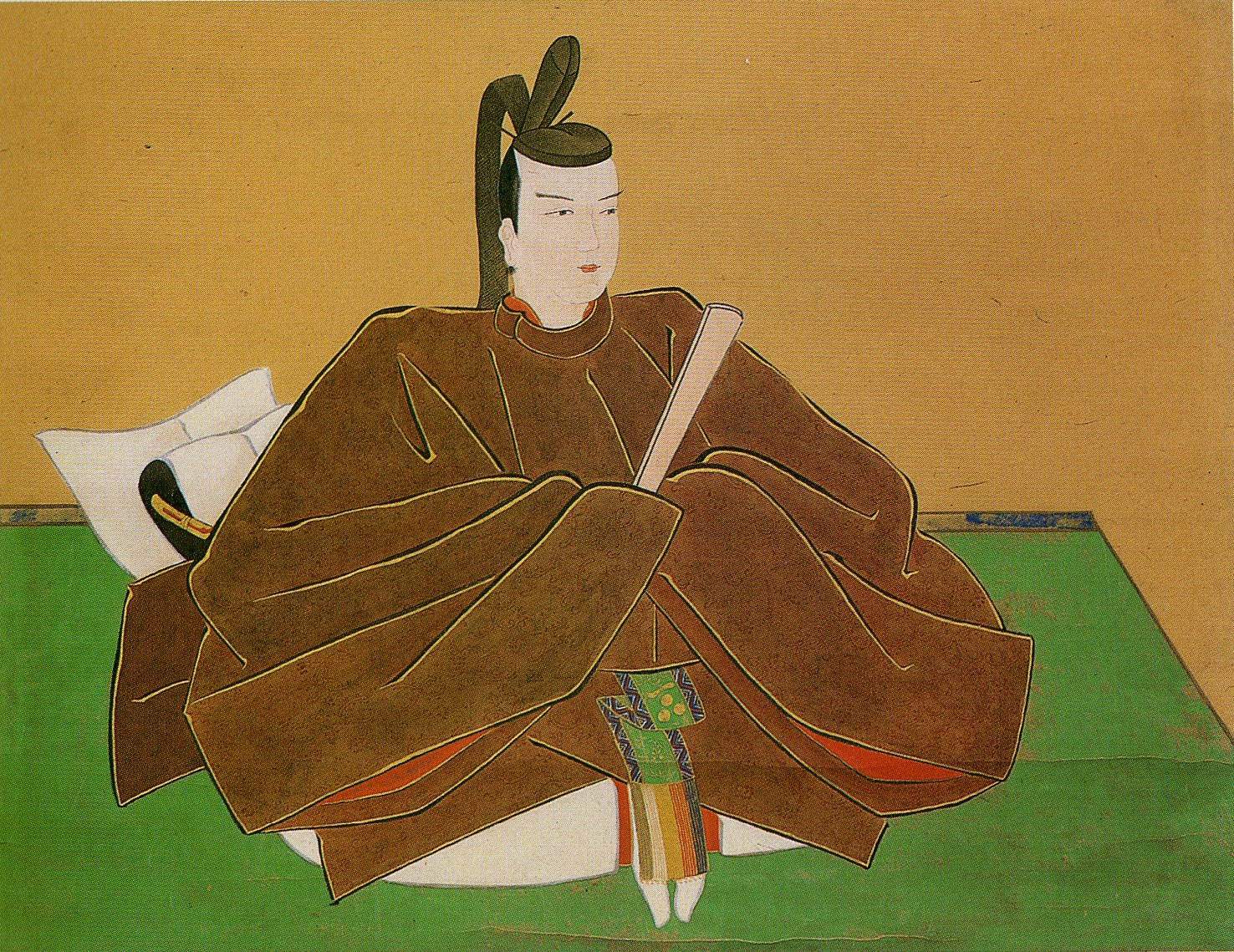 徳山藩二代藩主・毛利元賢の肖像画。